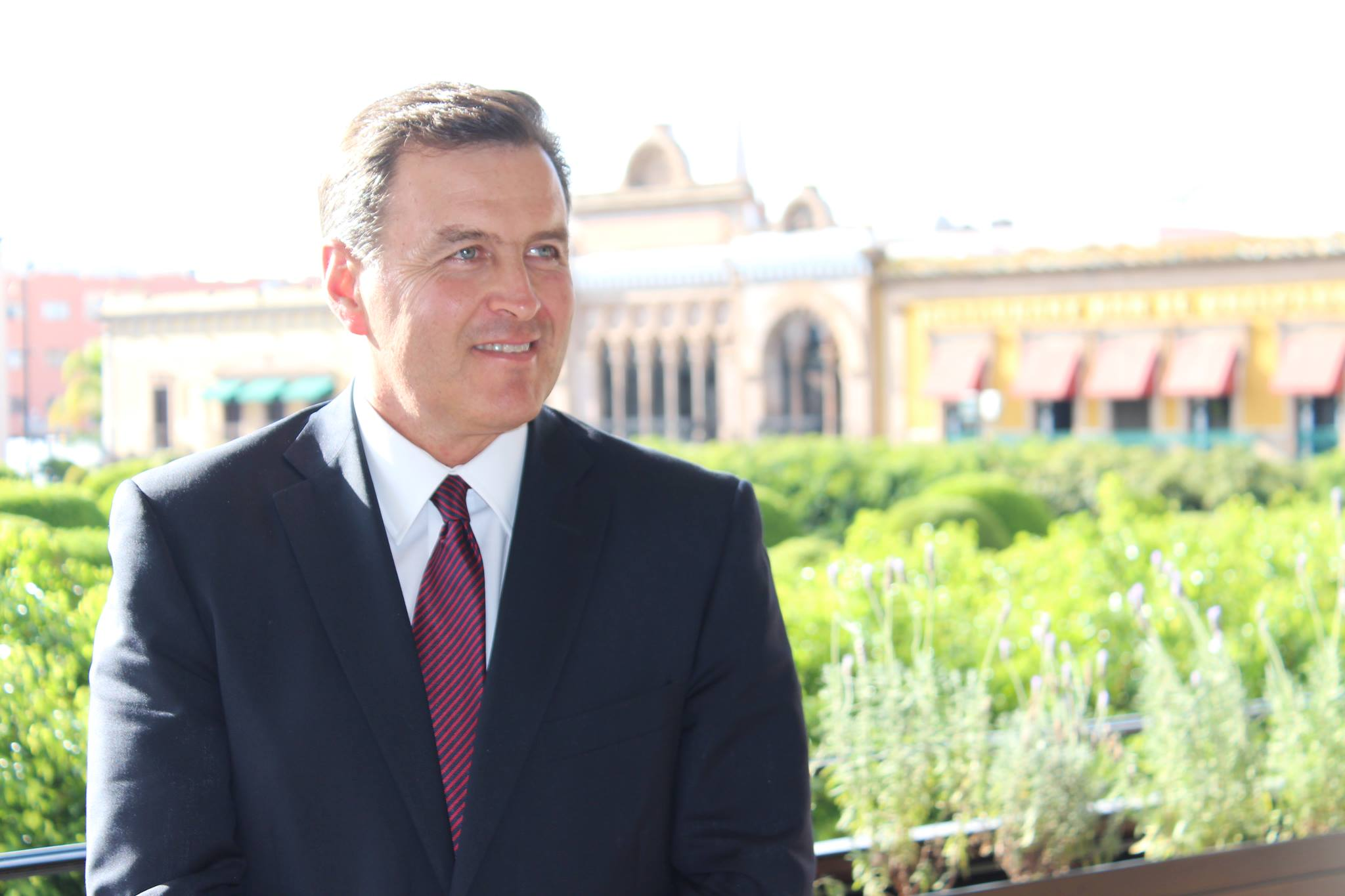 Politico